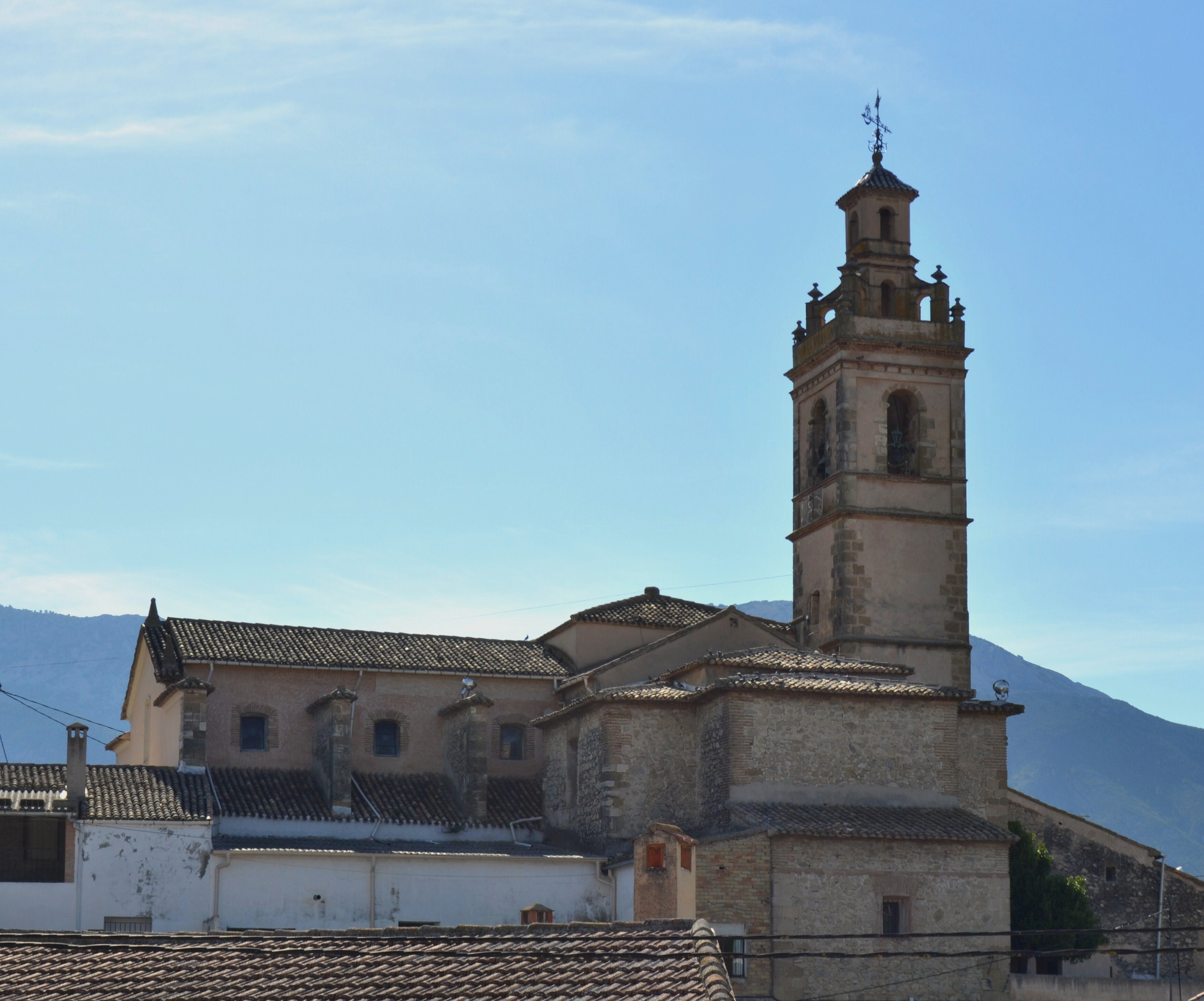 Església de l'Assumpció de Gorga. 26.073-002.